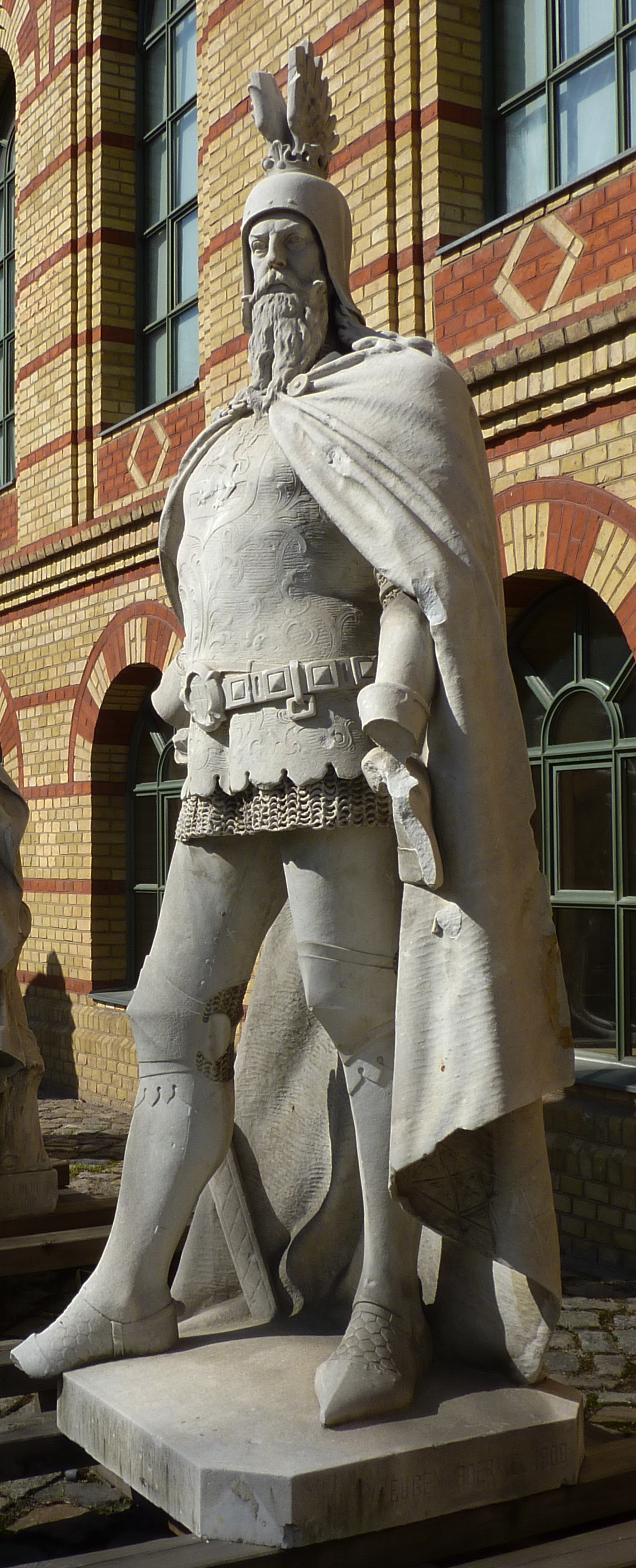 Siegesallee Gruppe 14 Sigismund, enthüllt 1900, Plastiker Eugen Boermel, Standort zZ Zitadelle Spandau